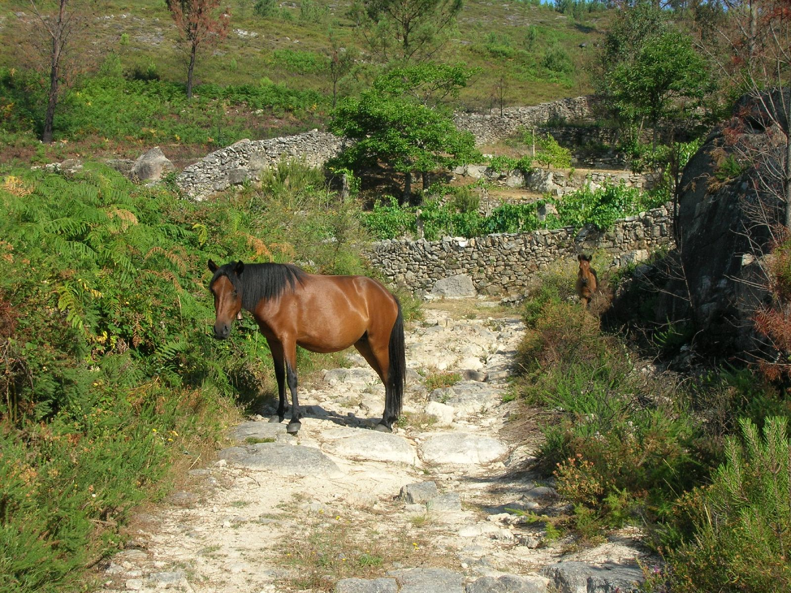 Ruta de Padrendo, Lobios. Cabalos